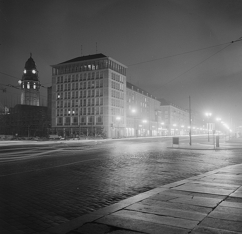 Original image description from the Deutsche Fotothek Dresden. Südseite der Ernst-Thälmann-Straße